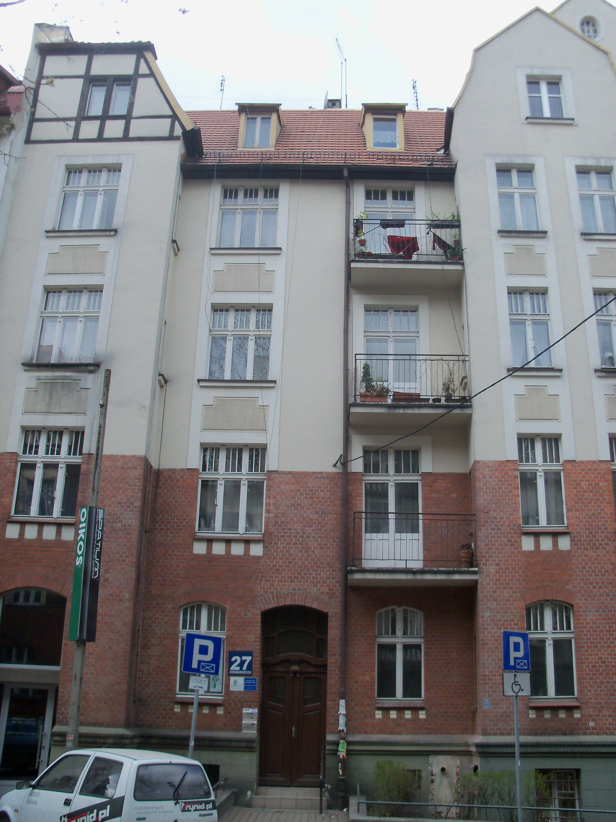 Katowice - budynek przy ul. Sienkiewicza 27